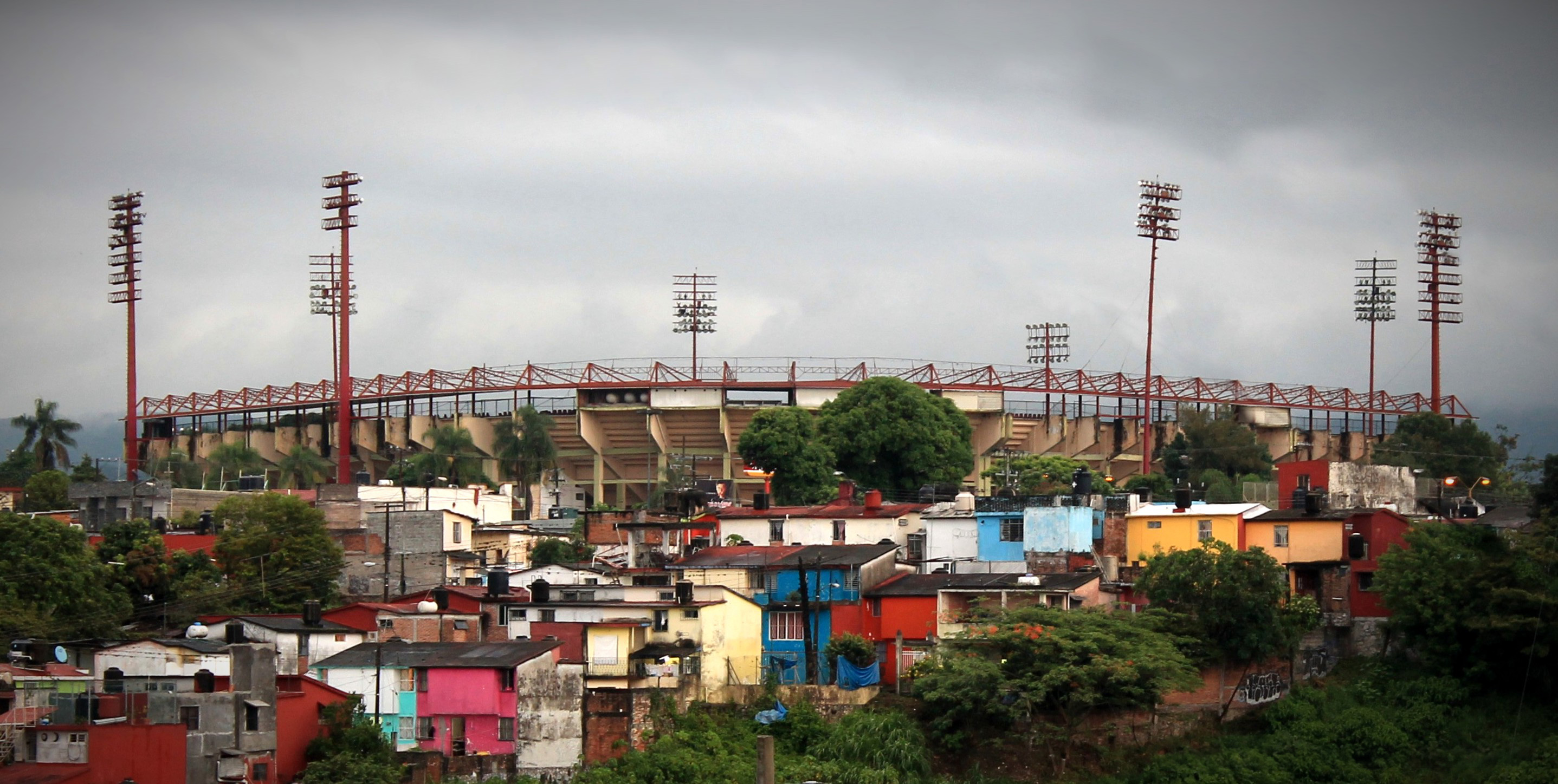 Estadio Beisborama 72 en Córdoba, Veracruz. Sede de los Cafeteros de Córdoba.